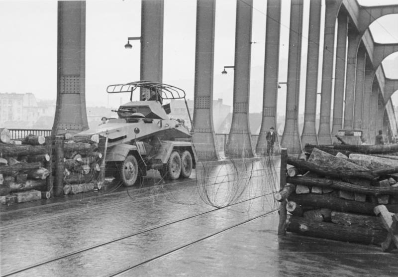 Heeres-Filmstelle. Bildabt. Einmarsch in das Sudetenland. Spähtruppführer stellt 2 Pz.-Spähwagen auf die Brücke und legt K-Rolle zwischen die tschechischen Brückensperren. The leader of a German Reconn. party posts two armored cars on the bridge and lays barbed wire 9.10.1938 Aussig, Sudetenland Information added by Wikimedia users.